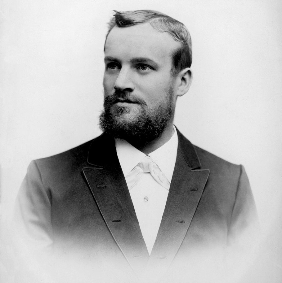 Jakob Roller